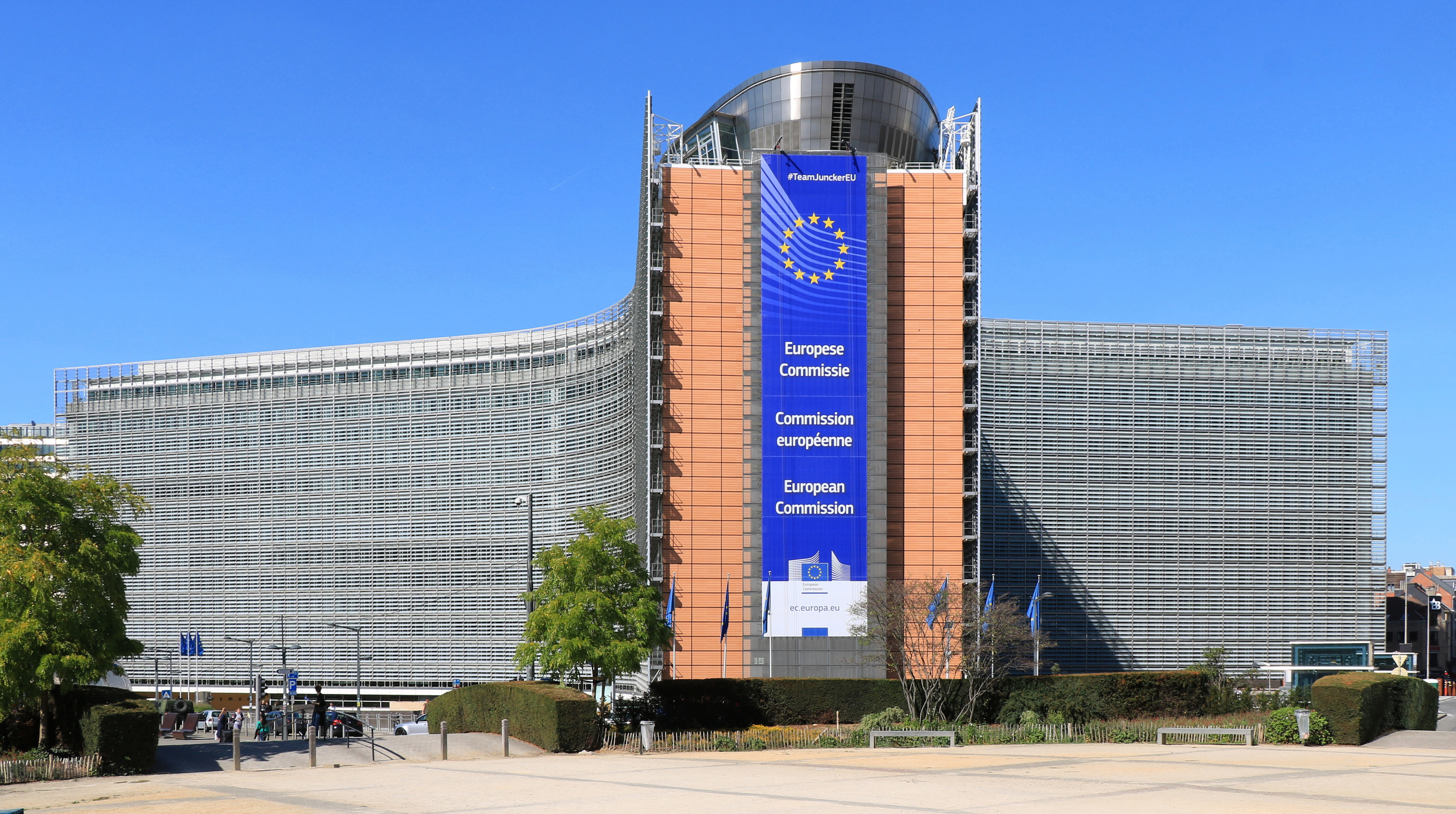 Belgique - Bruxelles - Schuman - Berlaymont - Siège de la Commission européenne